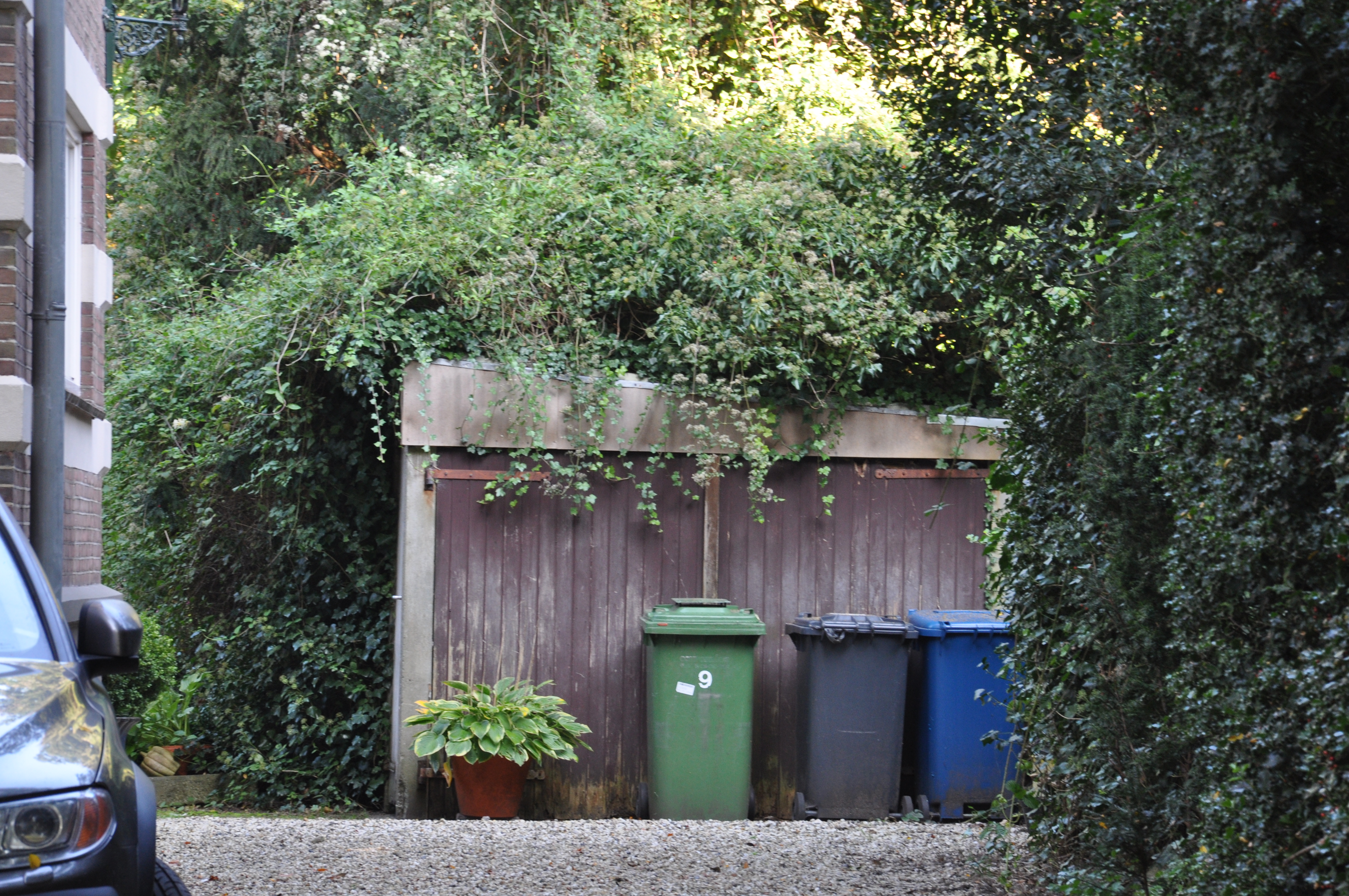 Apeldoorn Rhemensln9 koetshuis 514523